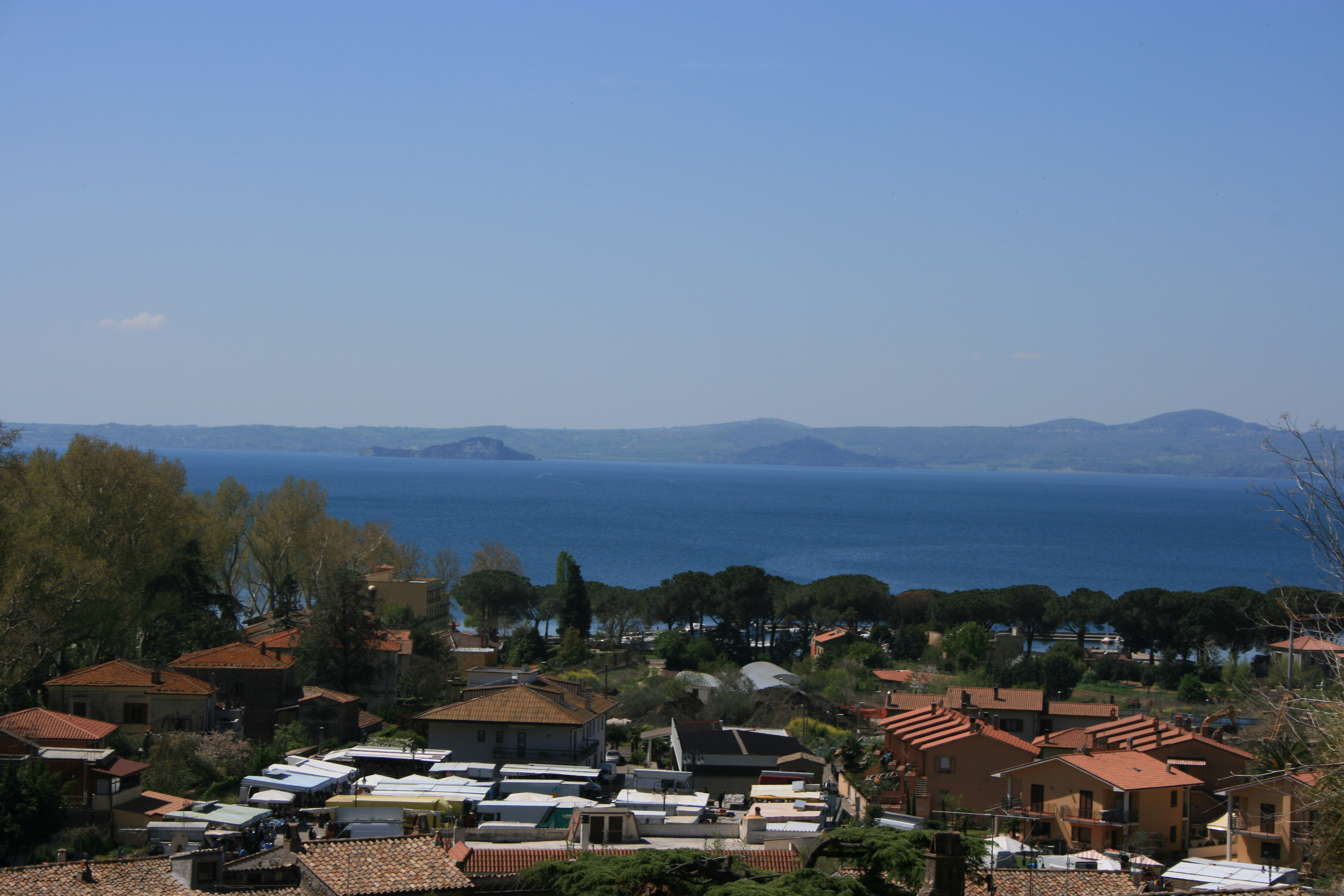 Lake of Bolsena